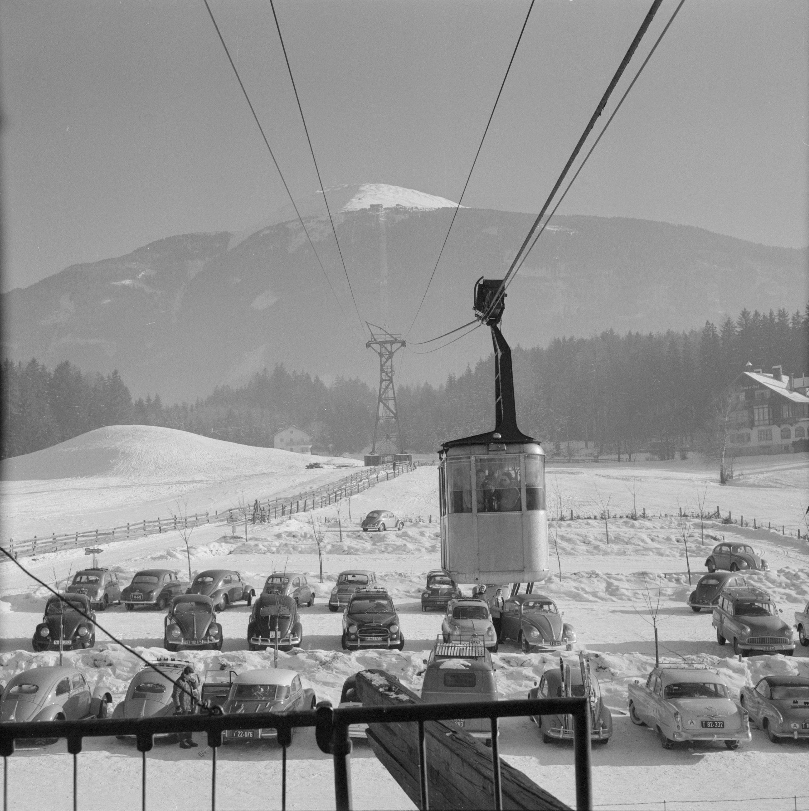 Collectie / Archief : Fotocollectie Van de Poll Reportage / Serie : Winter in Tirol Beschrijving : Een gondel van de kabelbaan naar de Patscherkofel boven de parkeerplaats Datum : januari 1960 Locatie : Igls, Oostenrijk, Tirol Trefwoorden : auto's, bergen, kabelbanen, landschappen, skiën, sneeuw, vakantie, winter, wintersport Fotograaf : Poll, Willem van de Auteursrechthebbende : Nationaal Archief Materiaalsoort : Negatief (6x6) Nummer archiefinventaris : bekijk toegang 2.24.14.02 Bestanddeelnummer : 254-4348